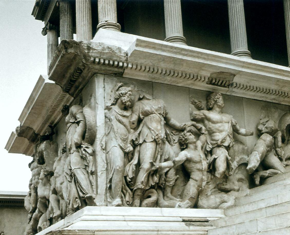 Berlin, Pergamon Múzeum, Zeusz-oltár, nyugati rizalitfríz: Nereus, Doris, Okeanosz-csoport